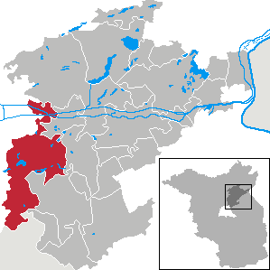 Wandlitz in Brandenburg (Country) - District Barnim